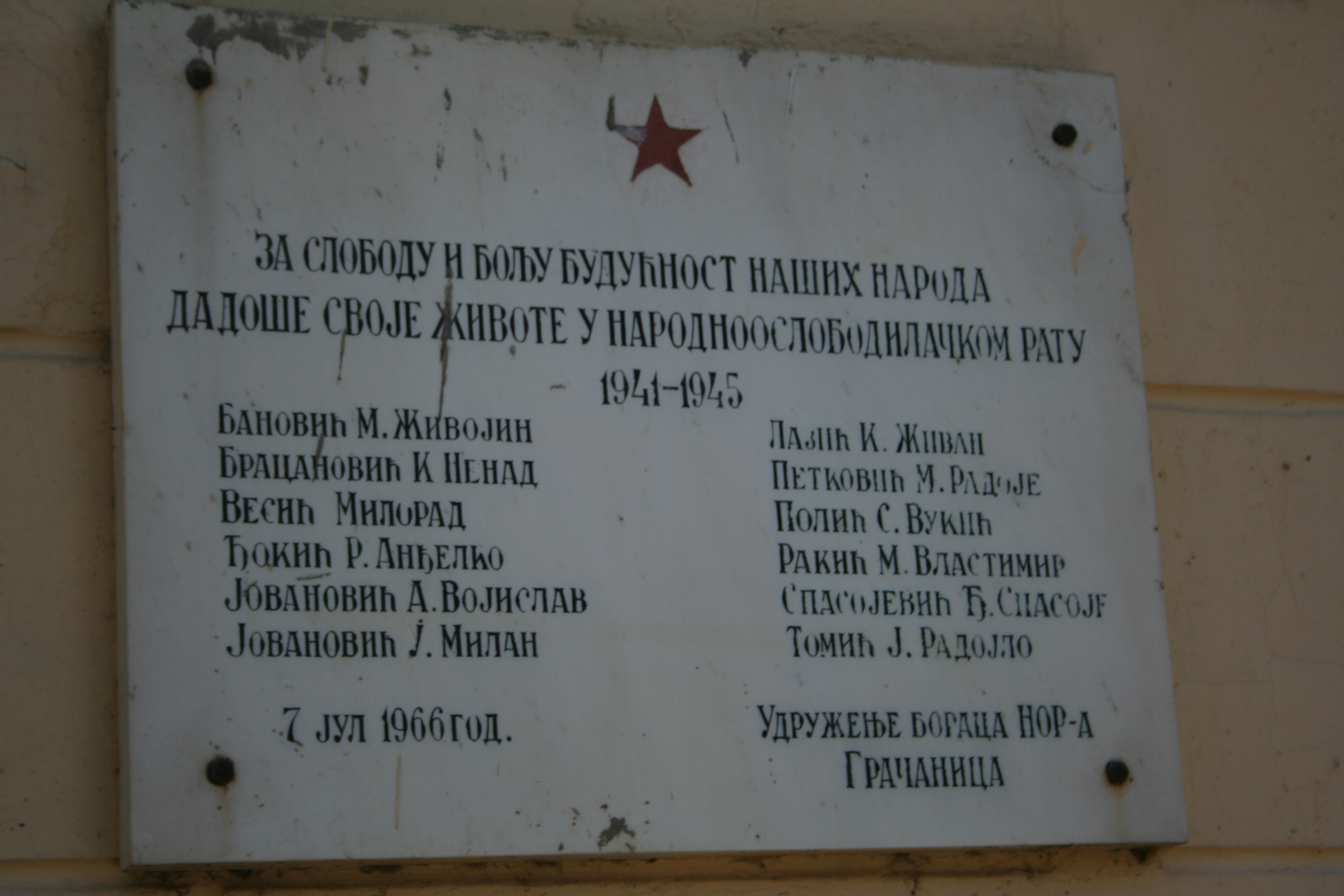 Centar sela, Gračanica